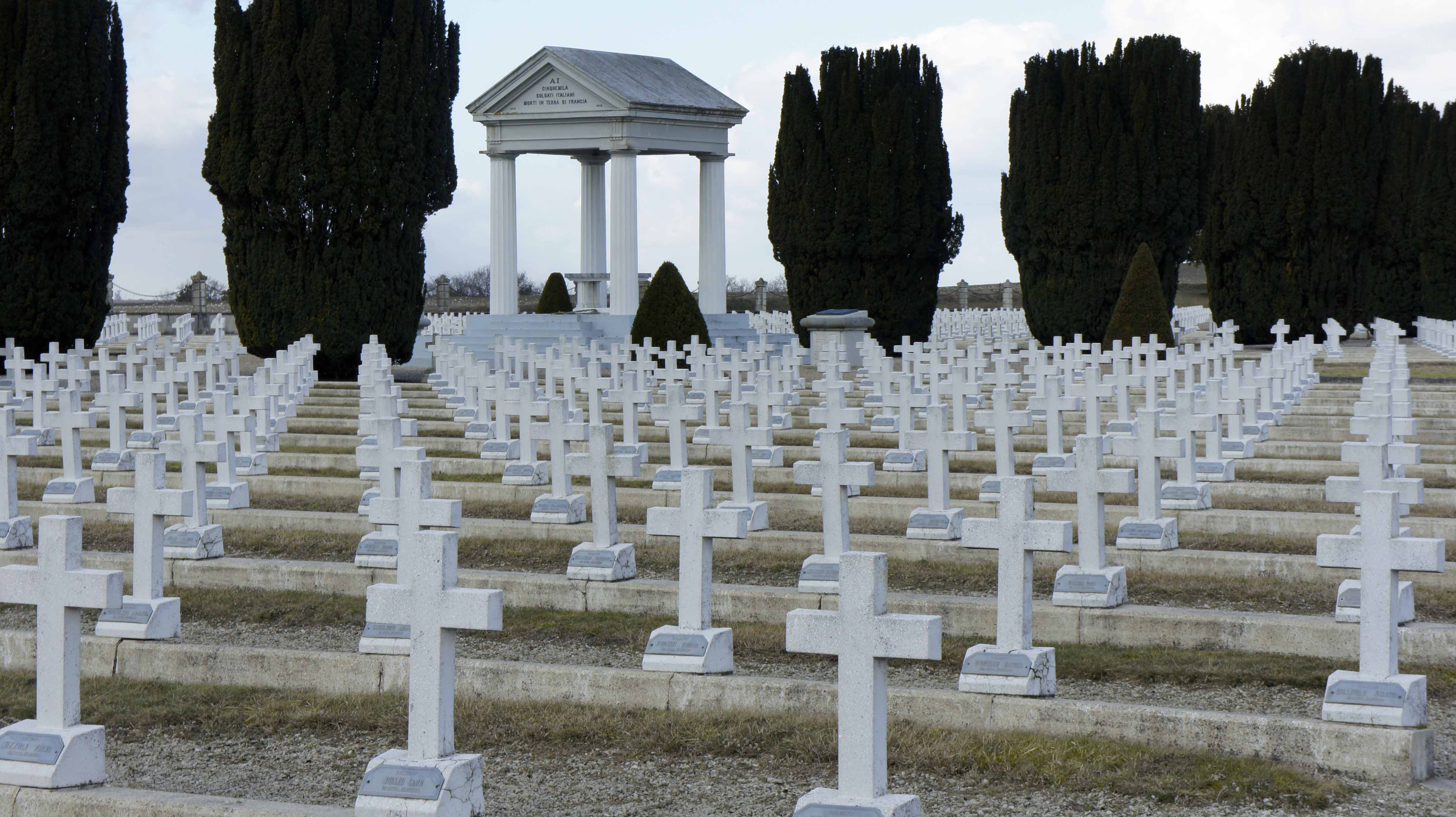 Cimetière italien Sarcy, vue du monument central.